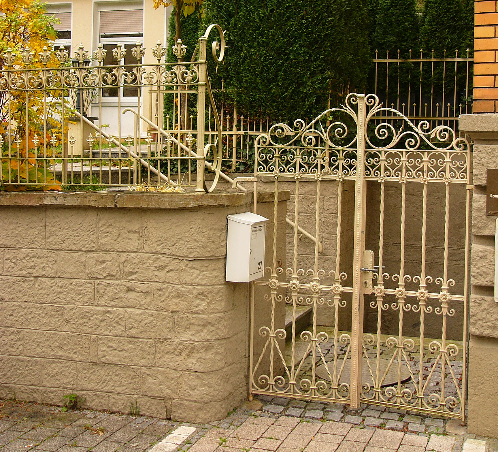 Einfriedung; Gusseisenzaun. This is a photograph of an architectural monument.